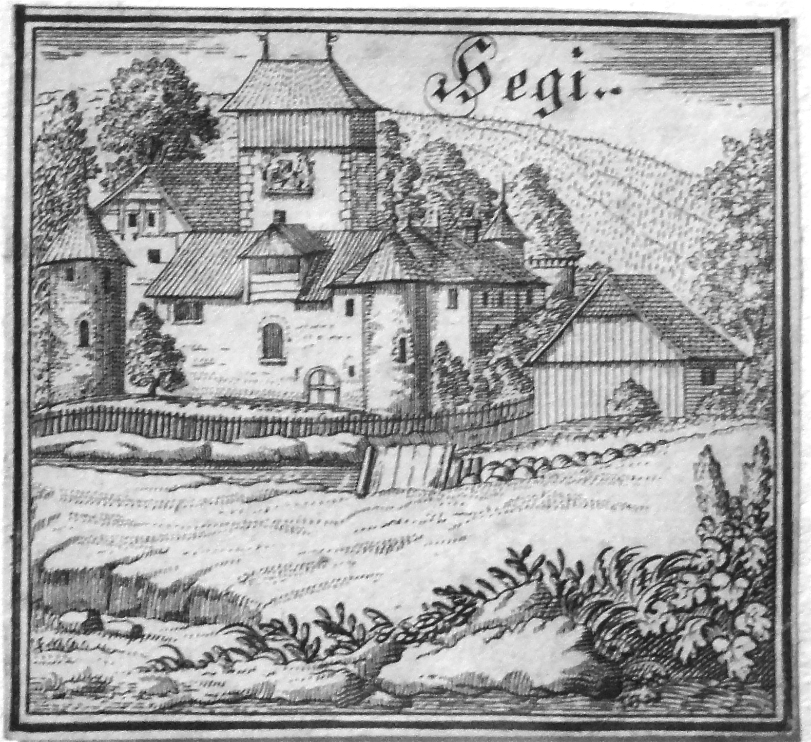 Schloss Hegi; Memorabilia Tigurina